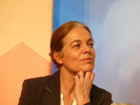 Anne Laperrouze lors de la Convention européenne du MoDem, le 8 février 2009.